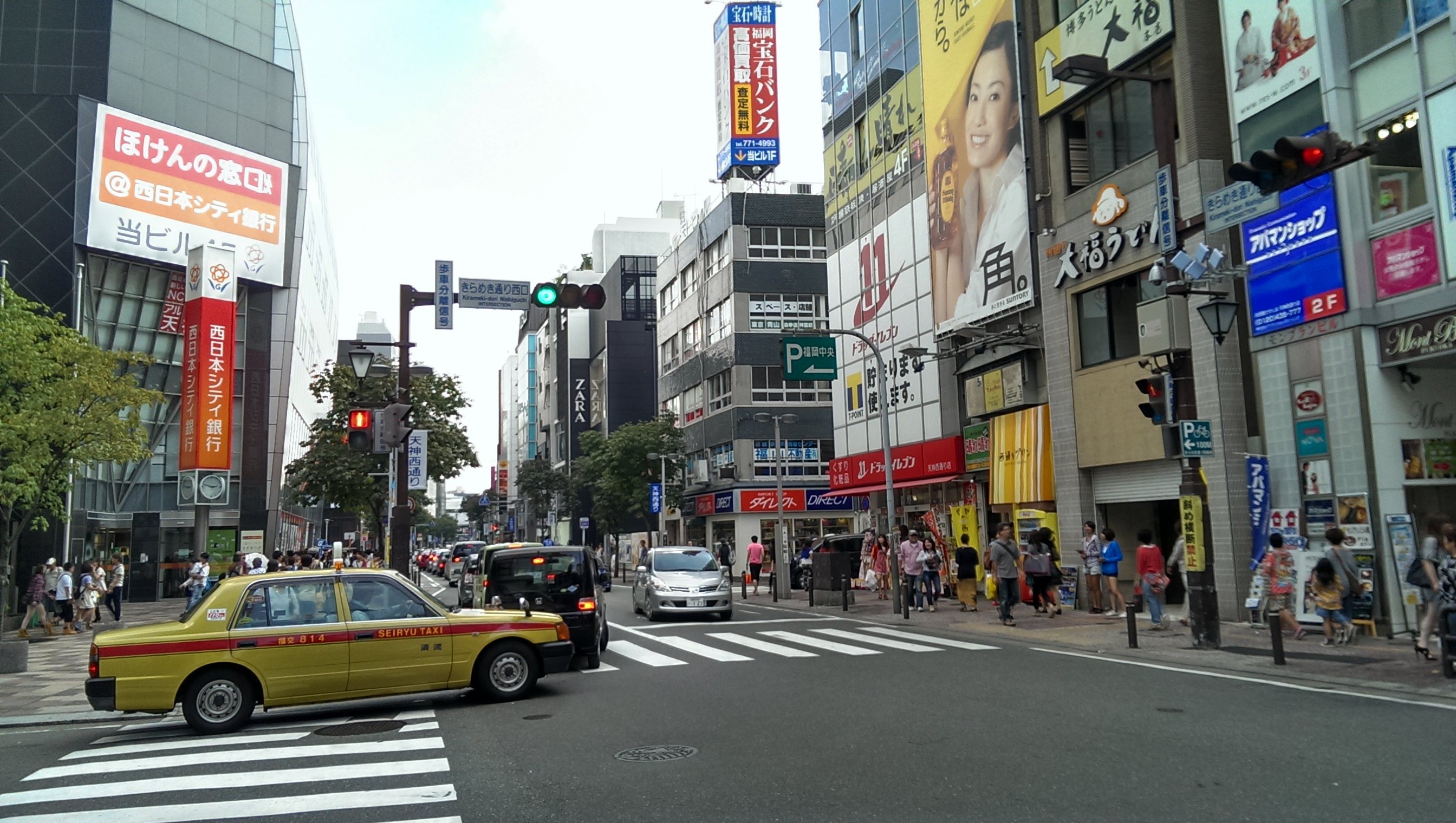 福岡市にある天神西通りの様子